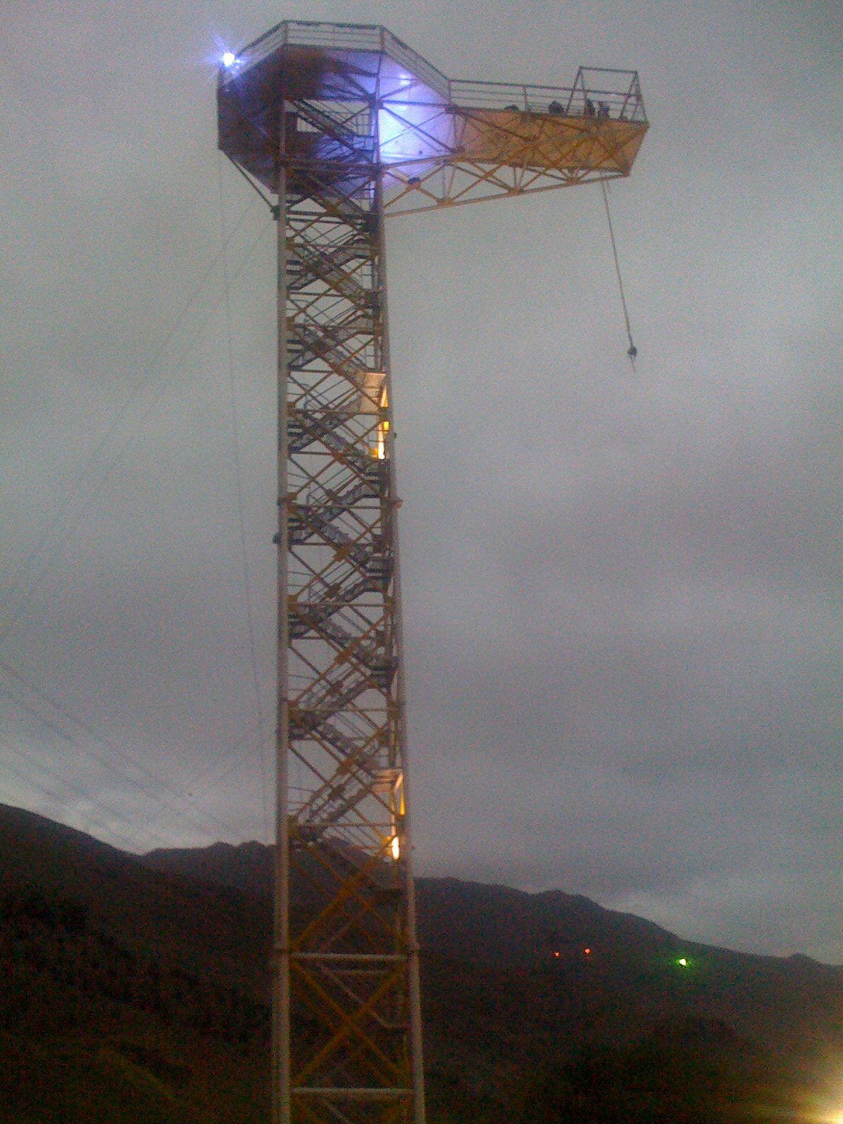 این عکس توسط اینجانب و از بام‌تهران، تهران، ایران می‌باشد. تاریخ گرفته‌شدن ۱۴/۰۳/۱۳۸۷ می‌باشد و توسط Iphone با دوربین ۲ مگاپیکسل گرفته شده‌است.